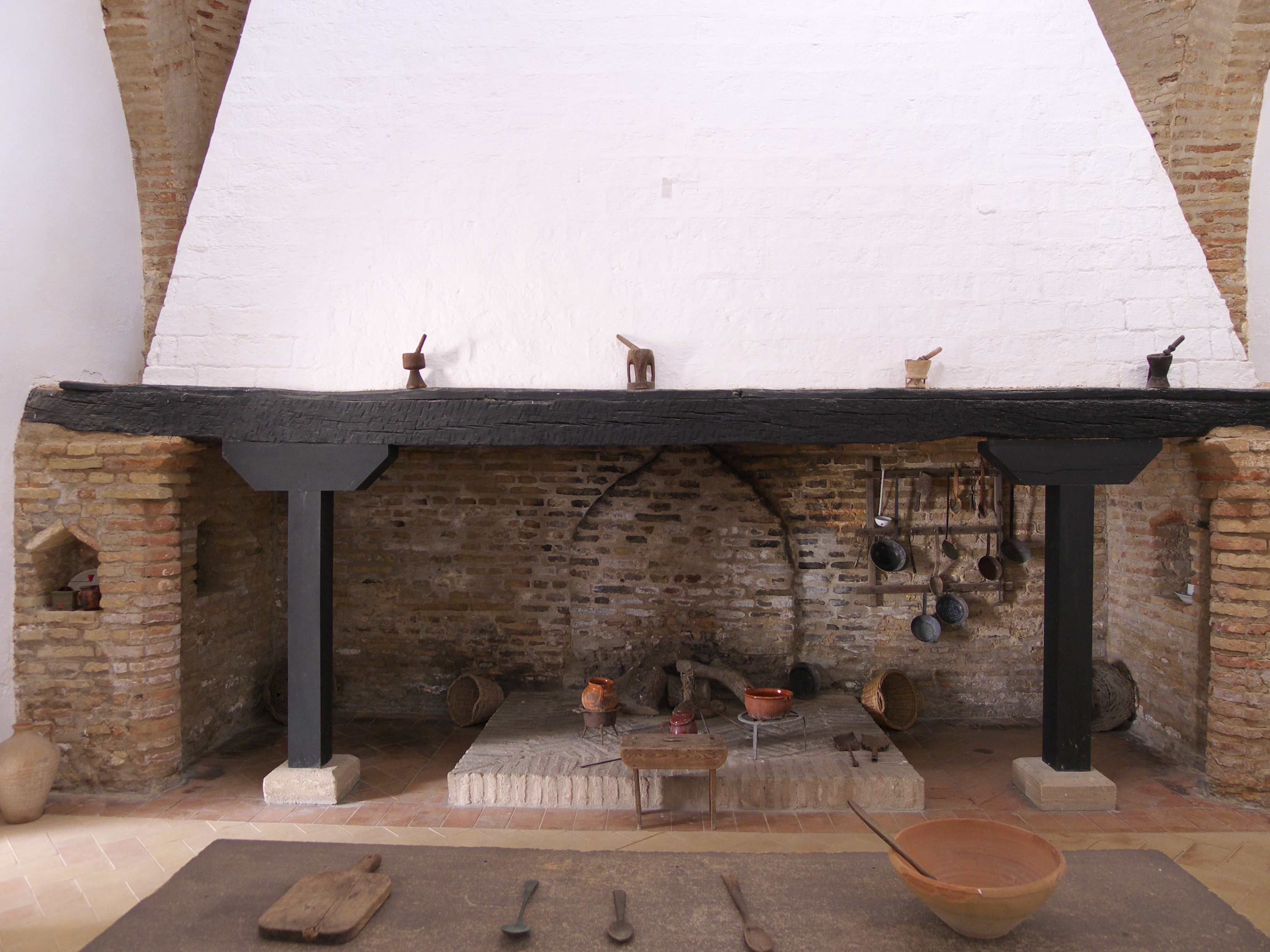 Cocina de las monjas clarisas franciscanas